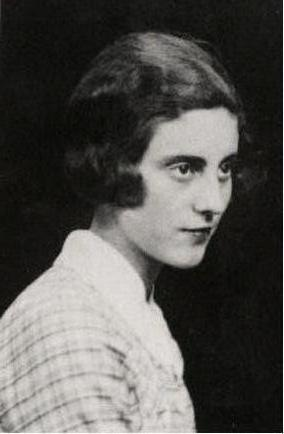 joven